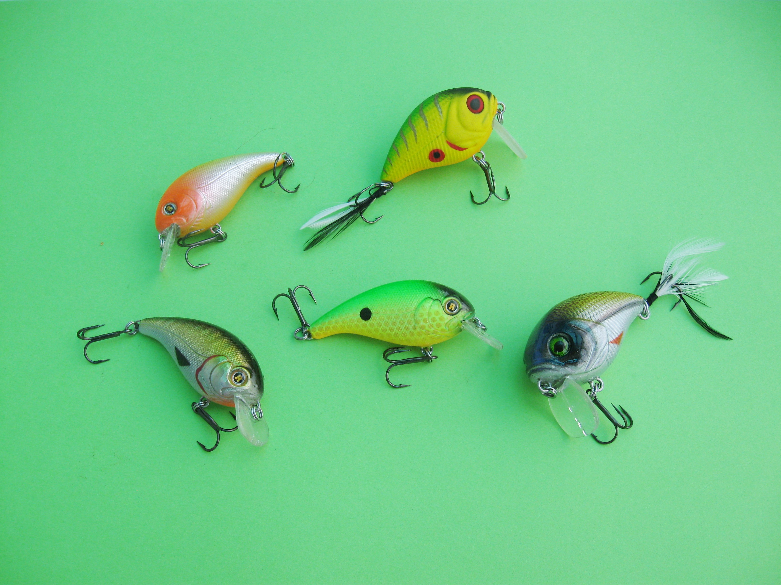 Воблеры кренкбейты, кренки